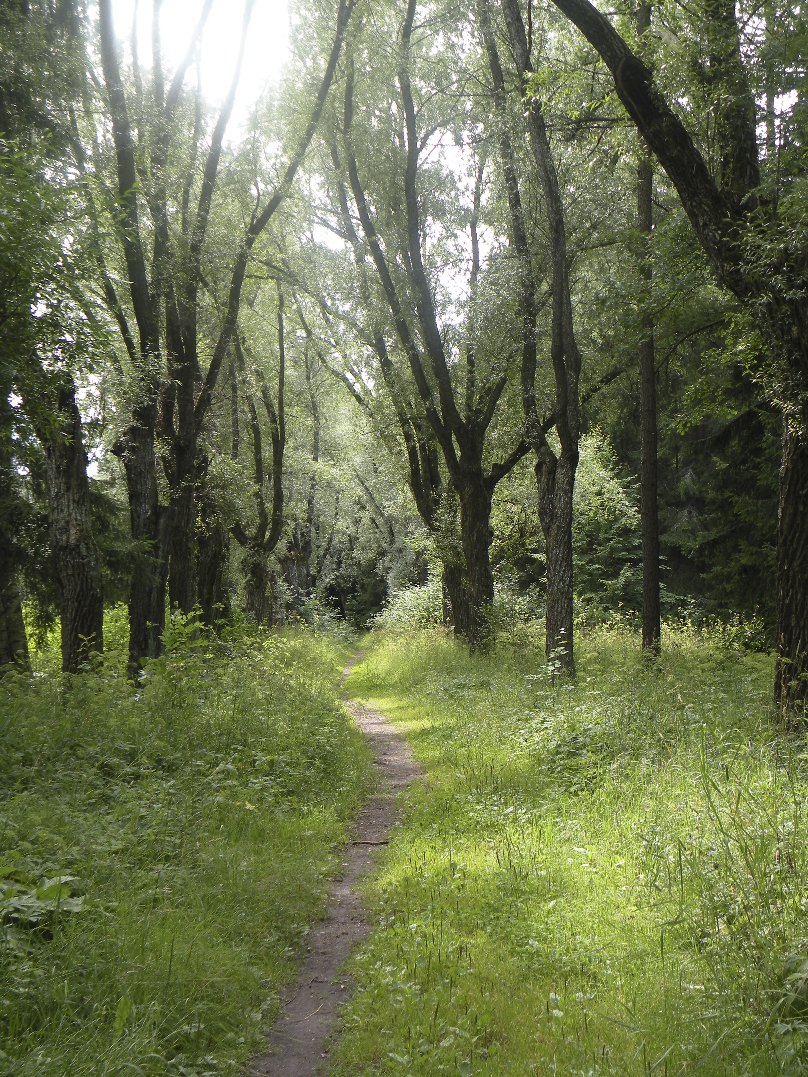 Баболовский парк.Аллея серебристых ив